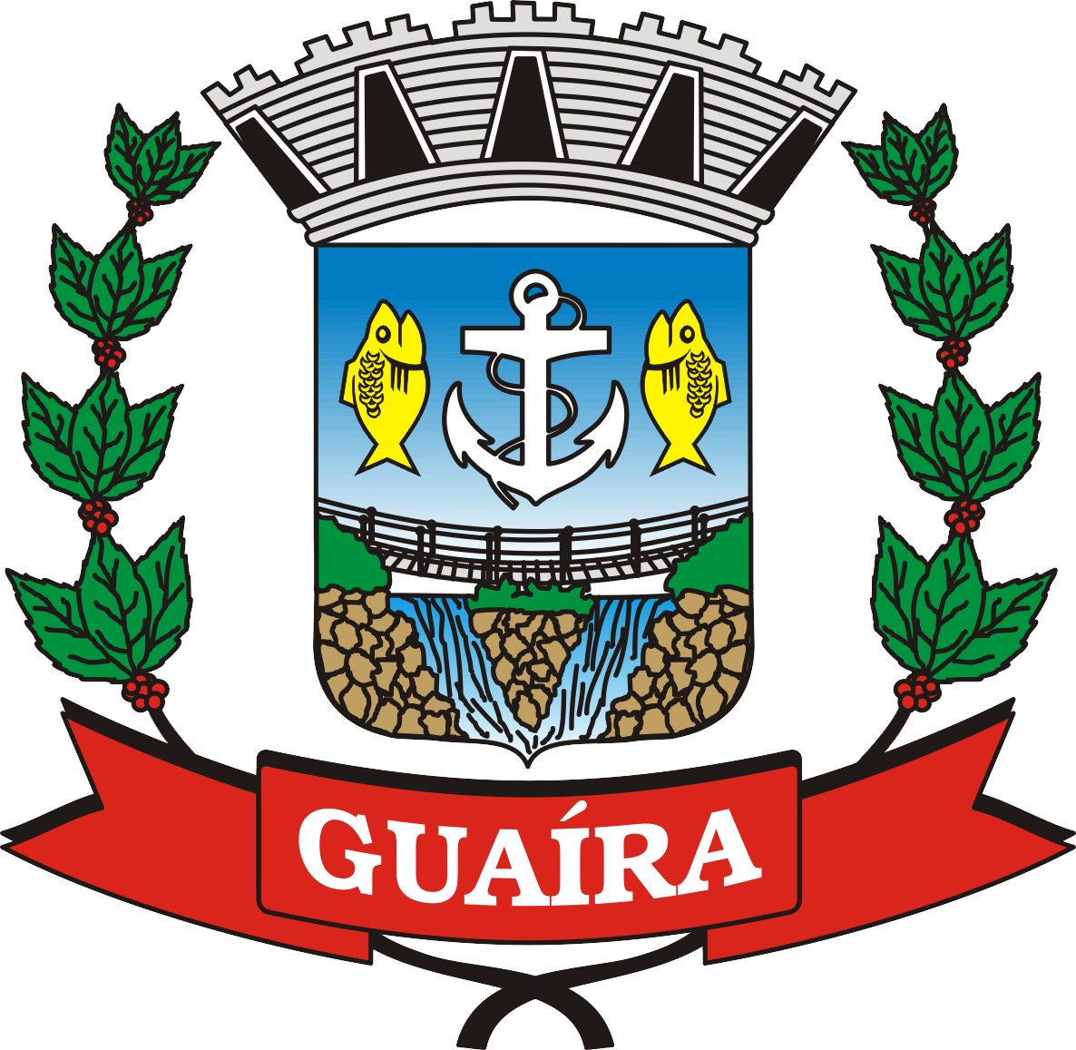 Brasão do município de Guaíra (PR, Brasil).